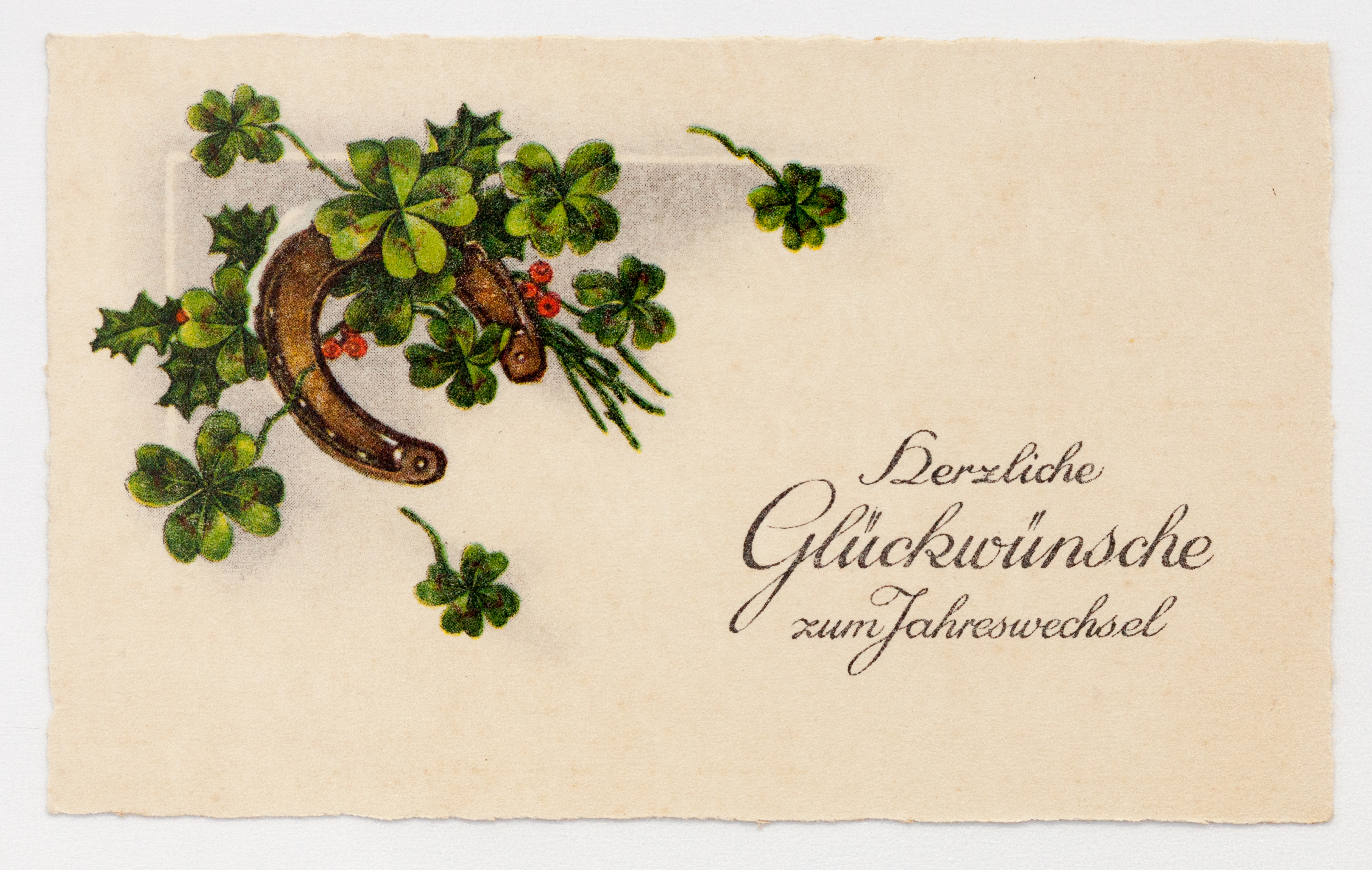 Feldpostbriefe von Hans Koch, Wien, 2. Weltkrieg, Ostfront, 1922-1945 vorheriger Brief (1944-12-19) Brief Nr. 301 (1944-12-29) nächster Brief (1945-01-04) Briefumschlag: Vorderseite Rückseite Brief: Seite 1 Seite 2 Karte - Vorderseite Karte - Rückseite TEXT (Farb-Zeichnung: vieblättriger Kleeblätter und Hufeisen als Glücksbringer) Herzliche Glückwünsche zum Jahreswechsel